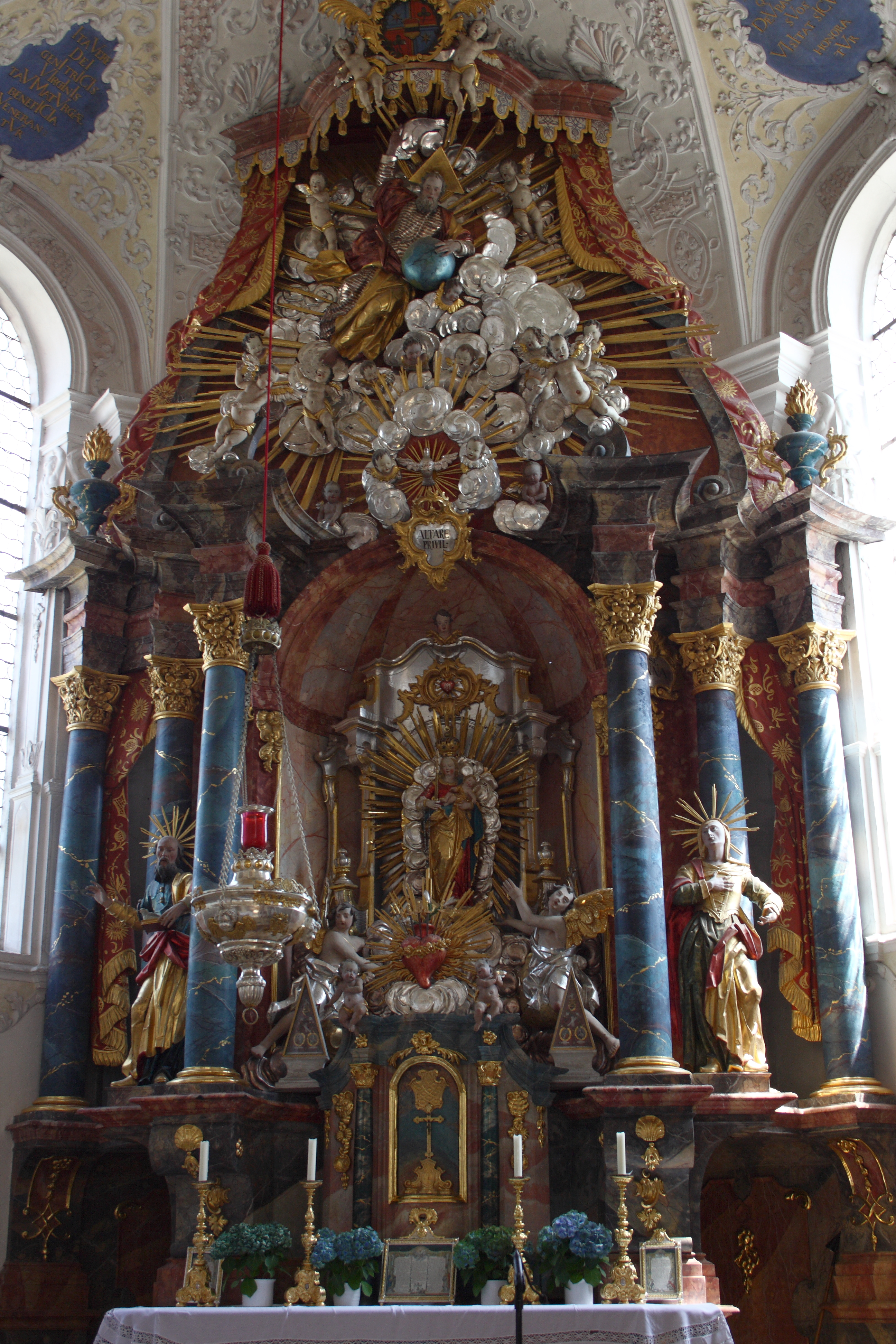 Katholische Pfarrkirche St. Martin in Deubach, einem Stadtteil von Ichenhausen im Landkreis Günzburg (Bayern), 1739/40 von Johann Martin Kraemer errichtet, Hochaltar